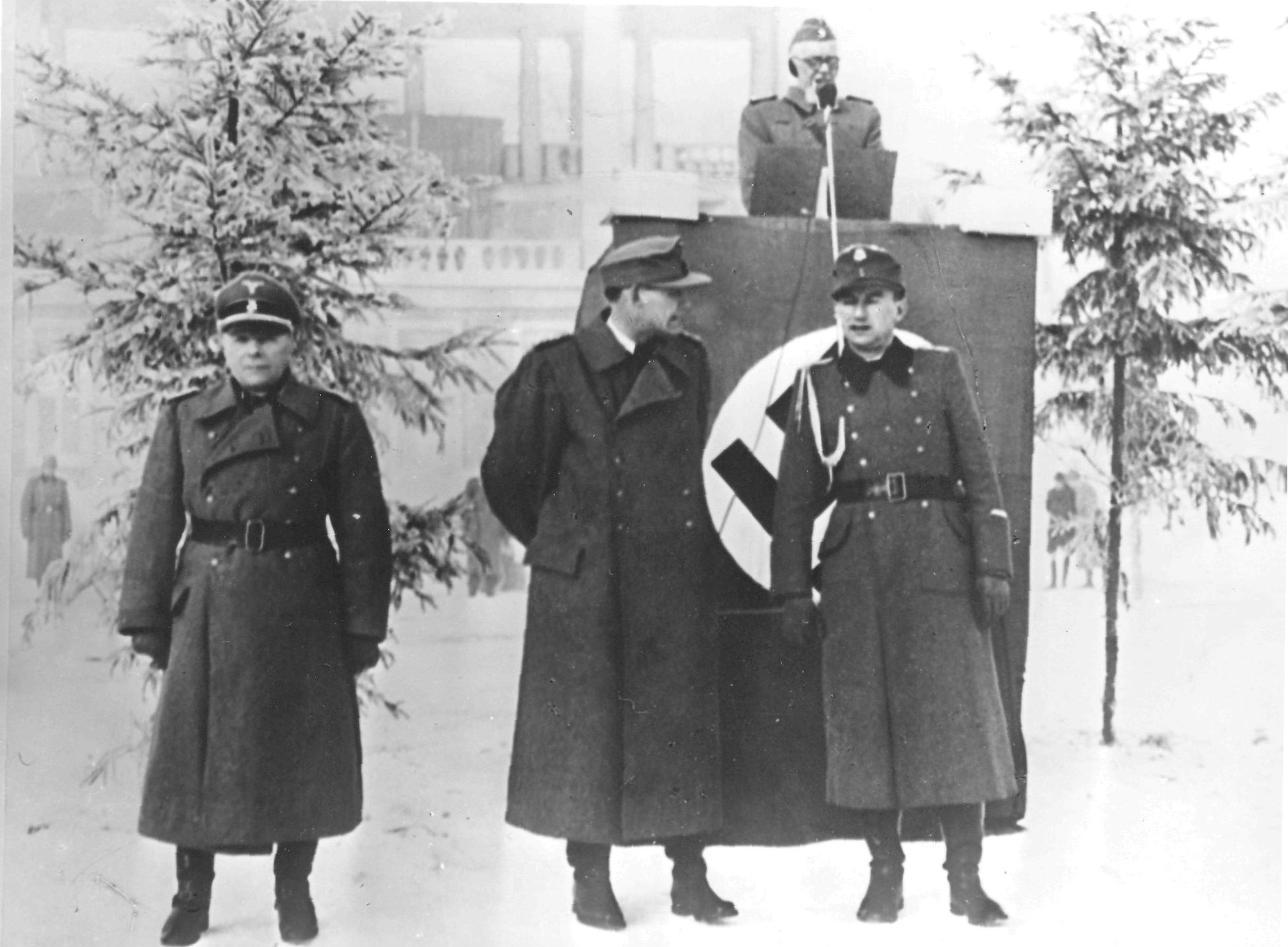 Srpskohrvatski / српскохрватски: Leon Rupnik, saradnik okupatora, govori na nacističkom skupu u Sloveniji tokom okupacije.